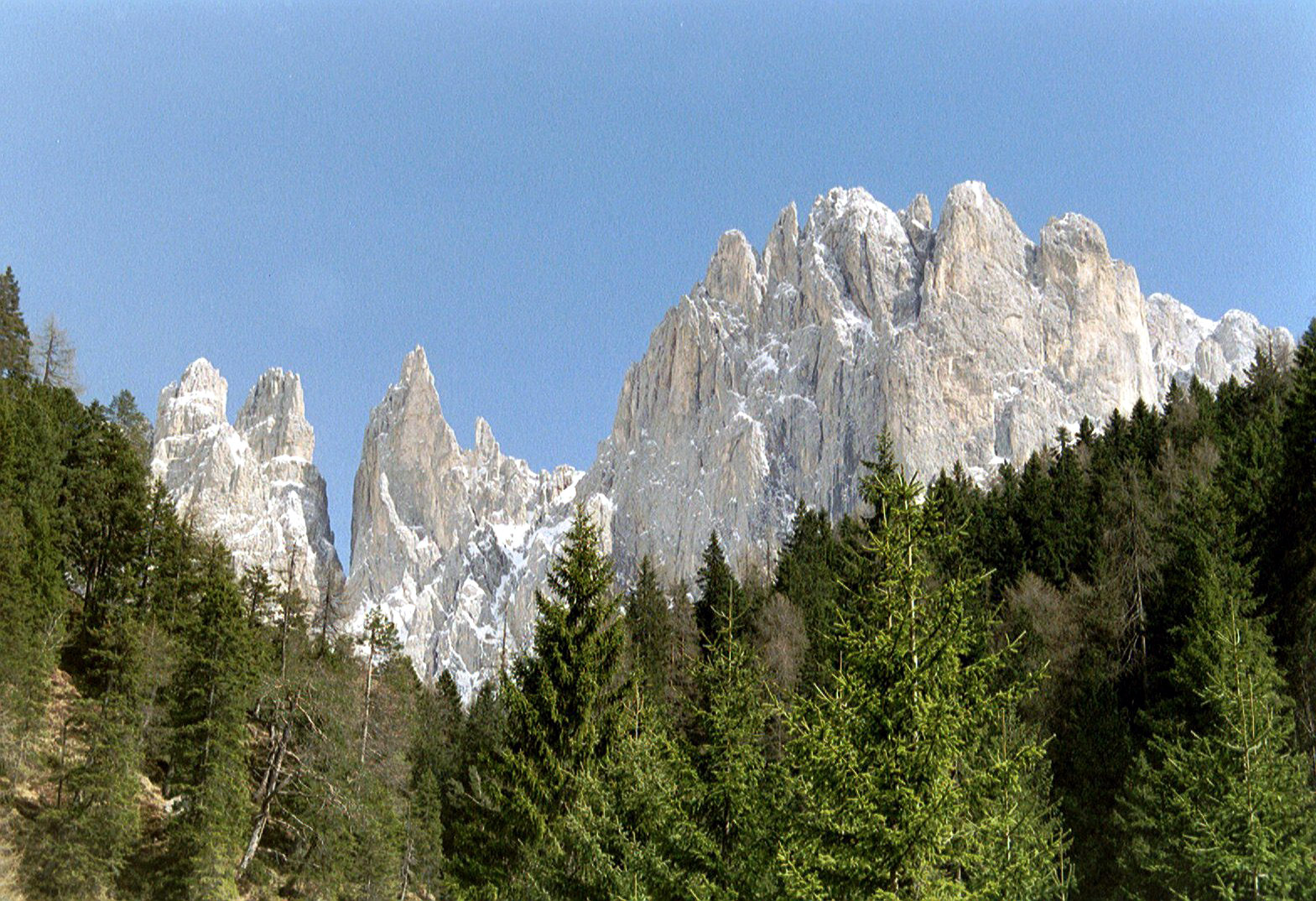 Rosengarten, Tiers, Dolomieten, Italie